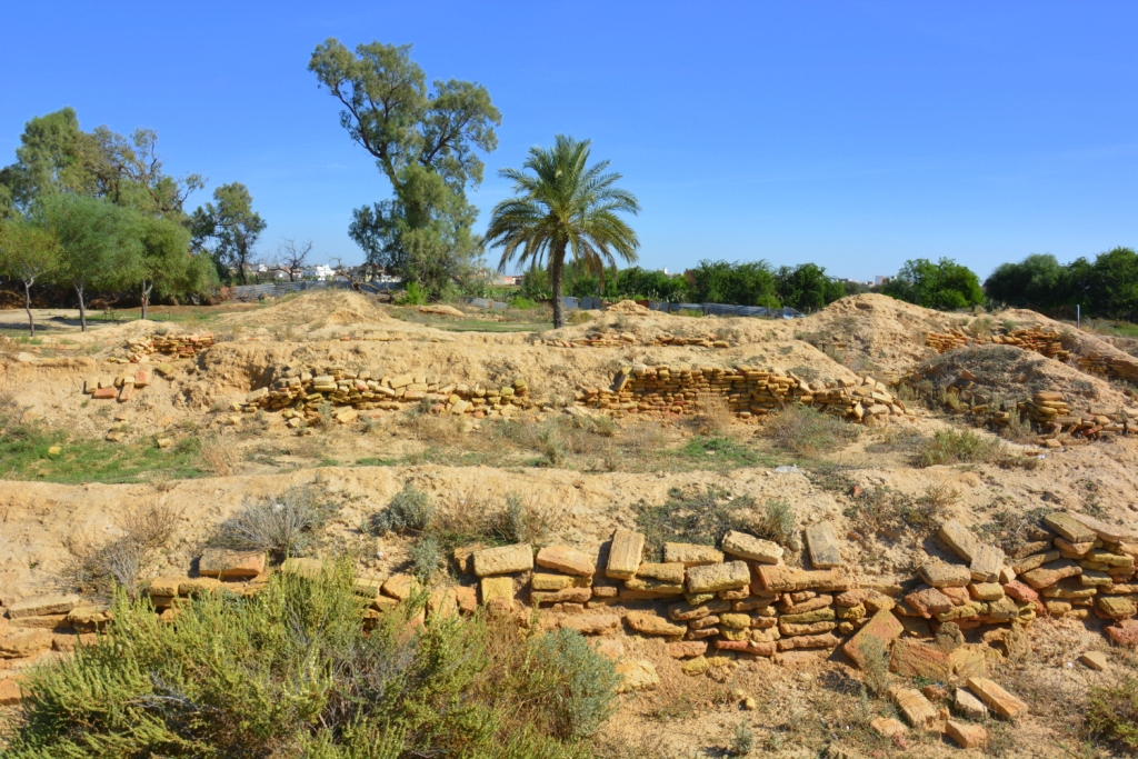 Ruines du palais d'El-Mansour, Sabra